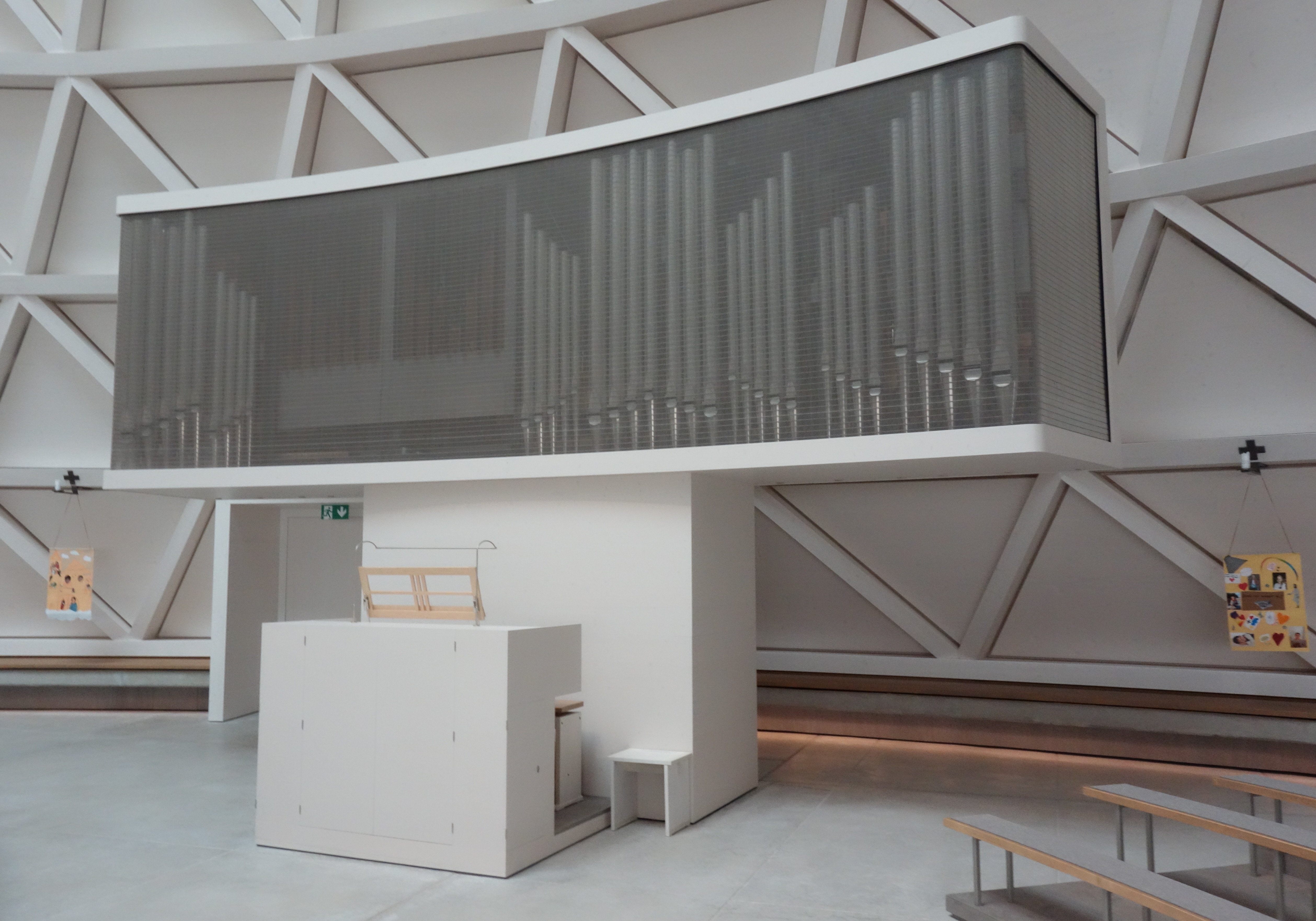 Orgel von St. Josef in Holzkirchen (Oberbayern) Neubau 2018 mit III/26 von Reinhard Frenger unter Verwendung von Material der Stöberl-Orgel von 1984 der alten Kirche.